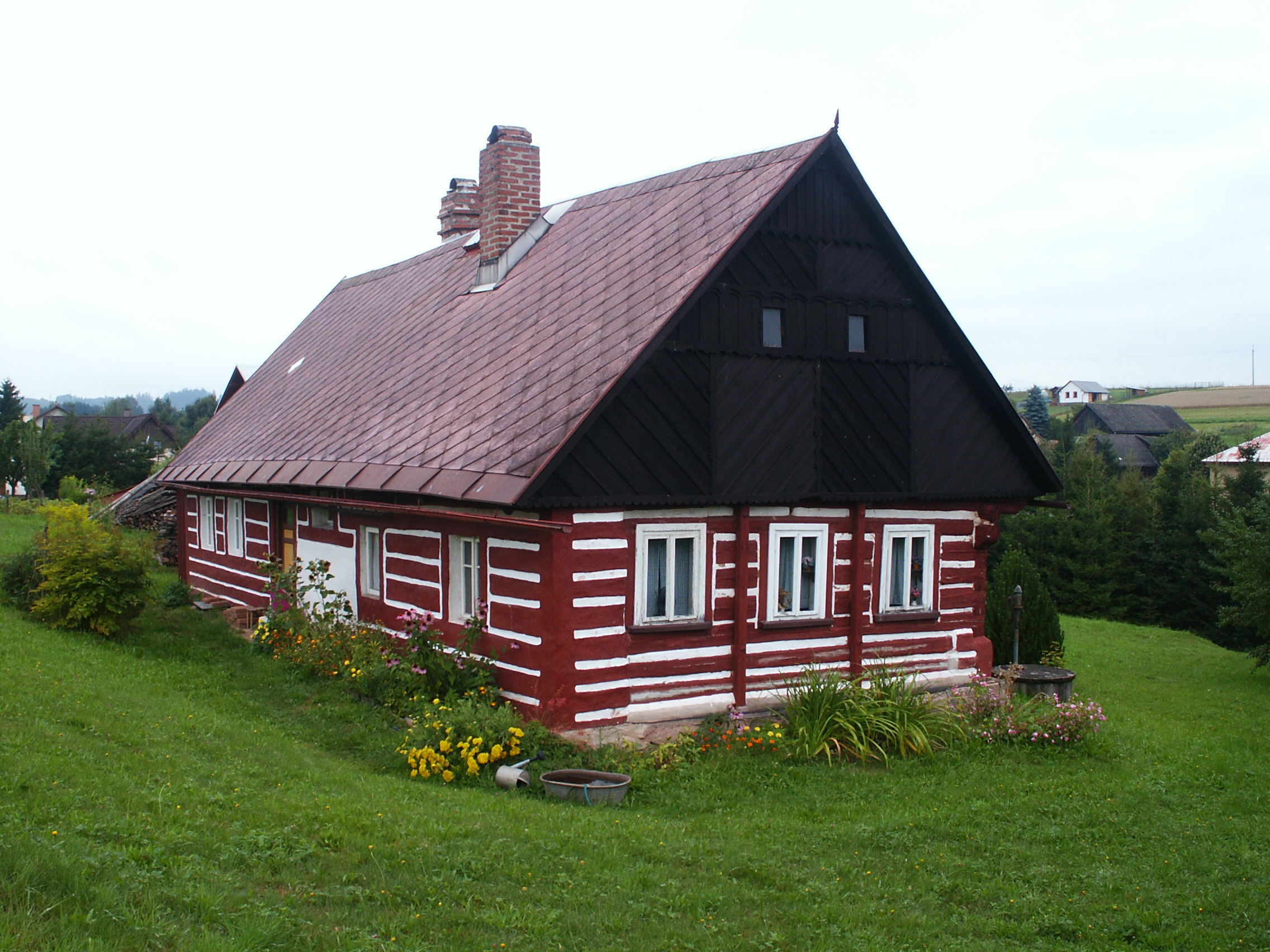 Venkovský dům (Čistá u Horek), Čistá u Horek 92